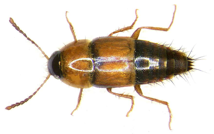 Familie: Staphylinidae Grösse: 3,5-4 mm Verbreitung: Europa Öklogie: überall gemein Fundort: Germania, Oberfranken, Selbitz leg.det. U.Schmidt, 1977 Foto: U.Schmidt, 2006